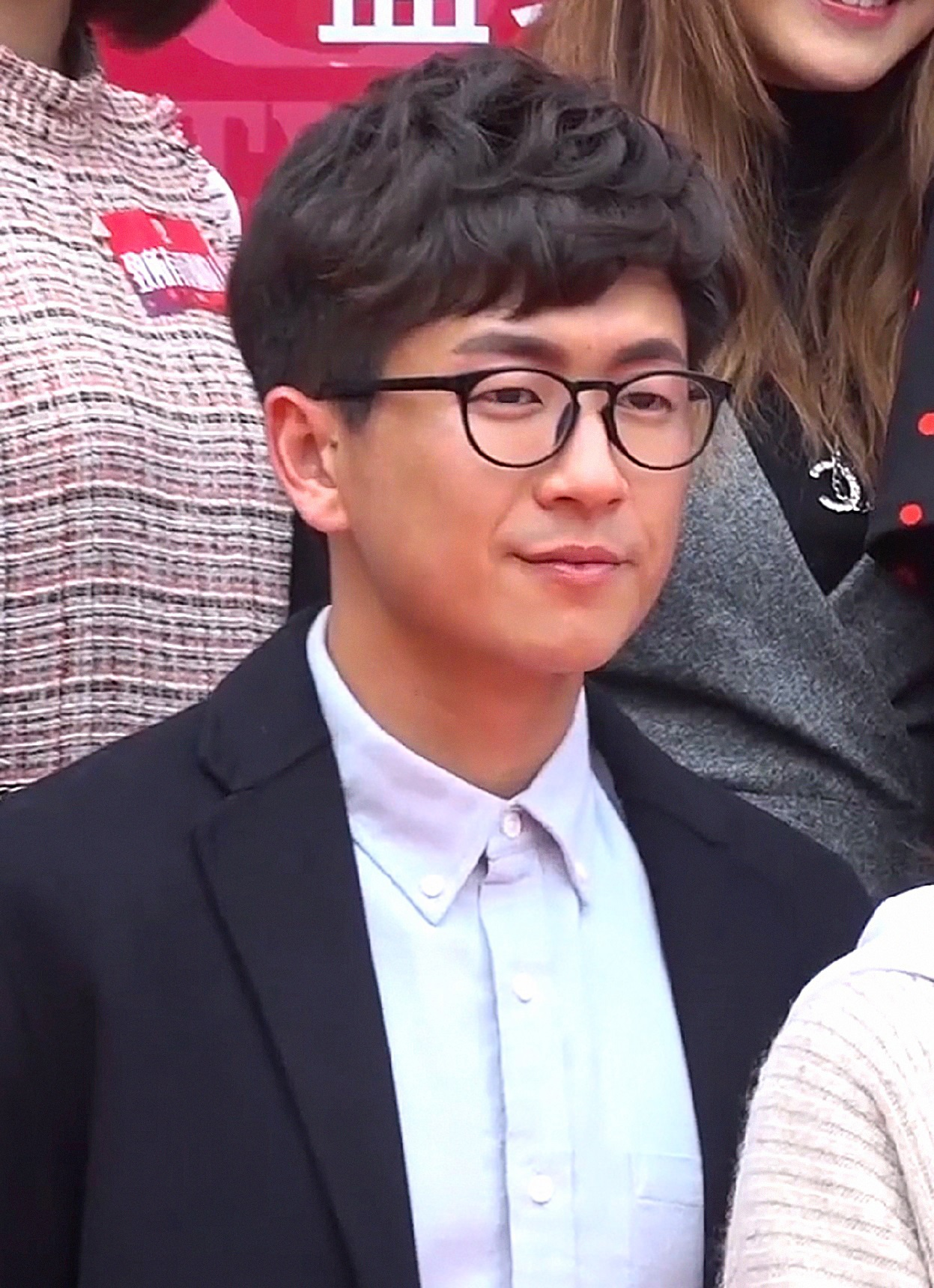 中文（香港）: 《那些我愛過的人》開鏡拜神記者會